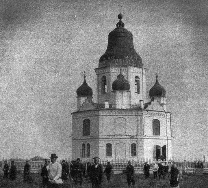 Церковь святого Иннокентия Иркутского в селе Аларь Иркутской губернии (1884-90)